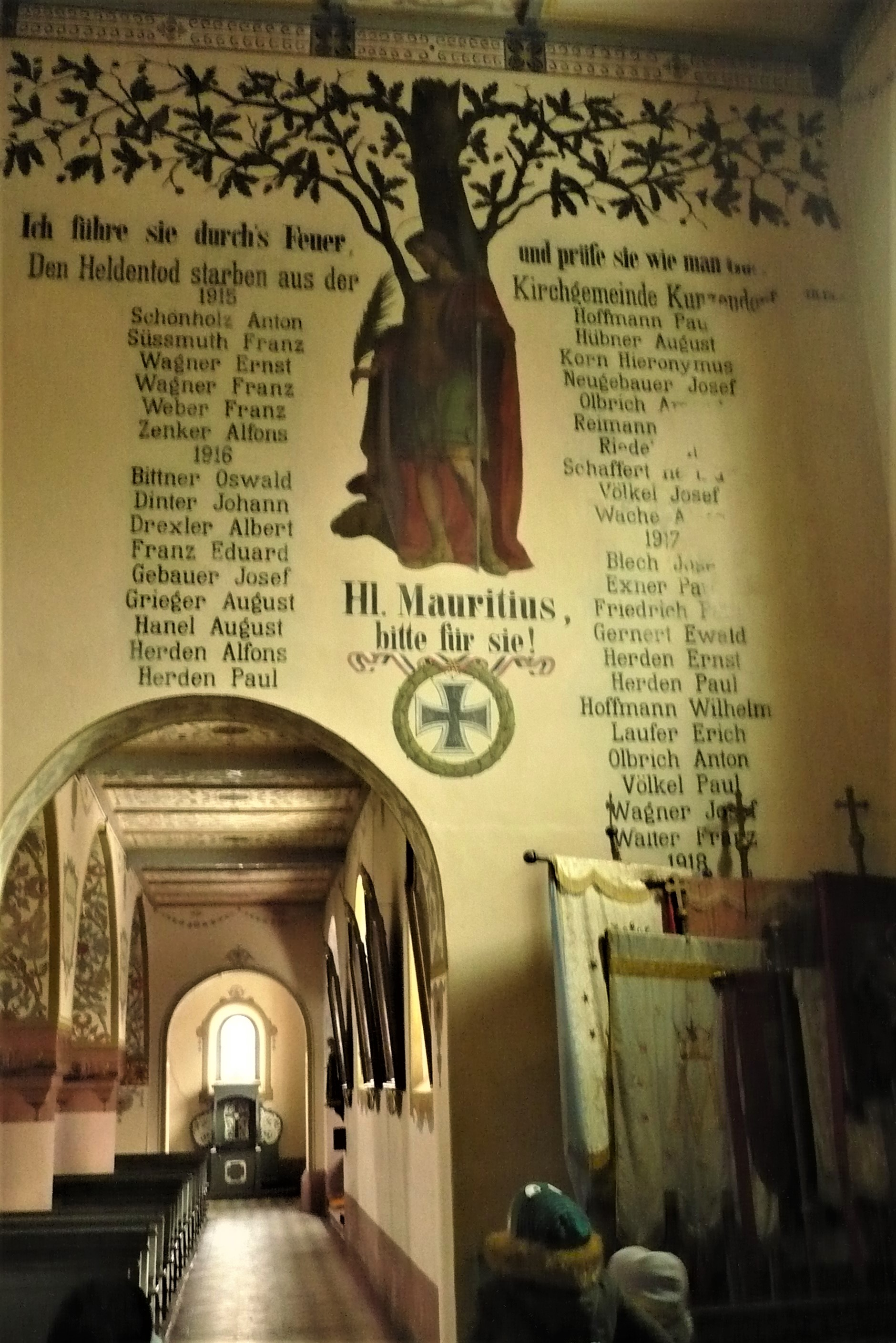 Kościół Barbary w Nowej Rudzie